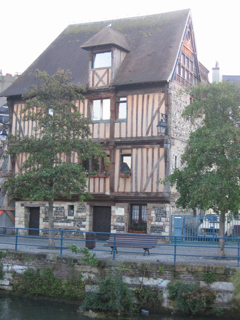 Harfleur, près du Havre, Seine-Maritime ; Source : photographie personnelle prise par l'utilisateur Urban, octobre 2004, GFDL Urban octobre 2004